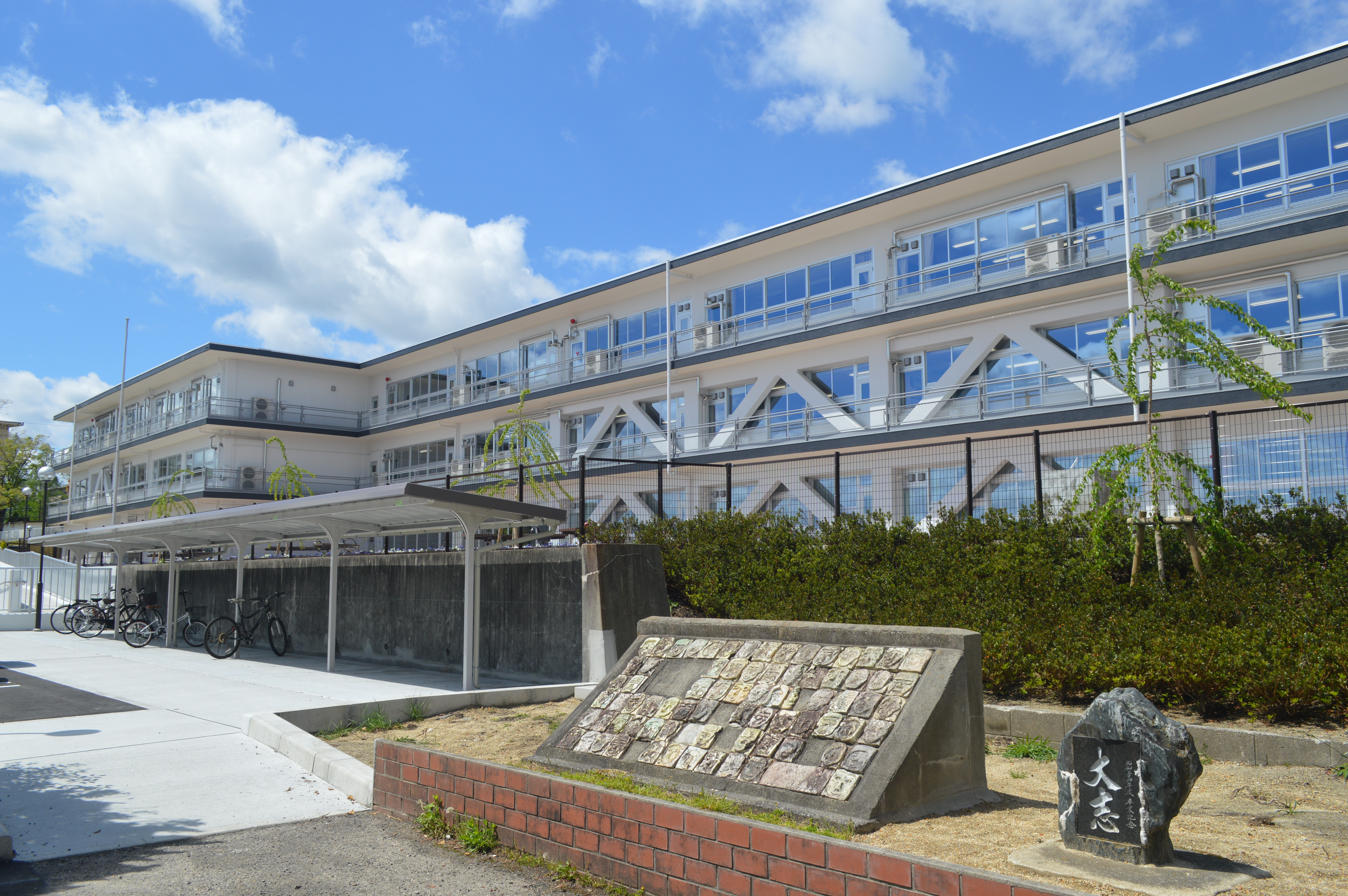 愛知県春日井市にある「グルッポふじとう」。